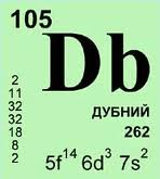 Дубний